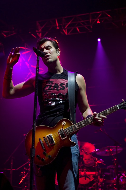 Ник Гексум, участник группы 311